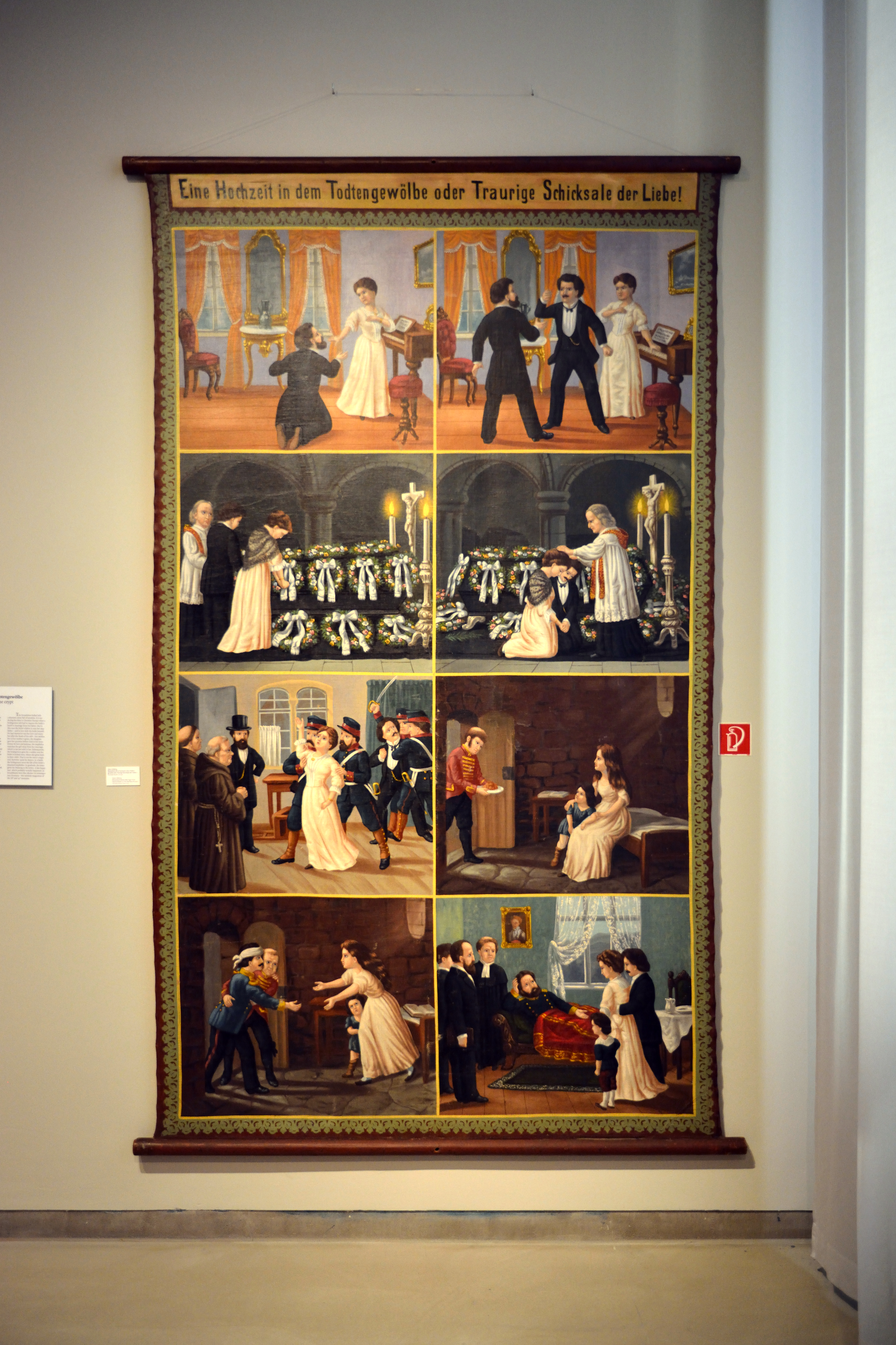 Impressionen aus dem Museum Europäischer Kulturen in BerlinHier: Moritat: Eine Hochzeit in dem Todtengewölbe oder Traurige Schicksale der Liebe. Genaue Erklärung des Bildes File:Berlin, Museum Europäischer Kulturen, GLAM on Tour im Museum Europäischer Kulturen (2018) NIK 6008.jpg